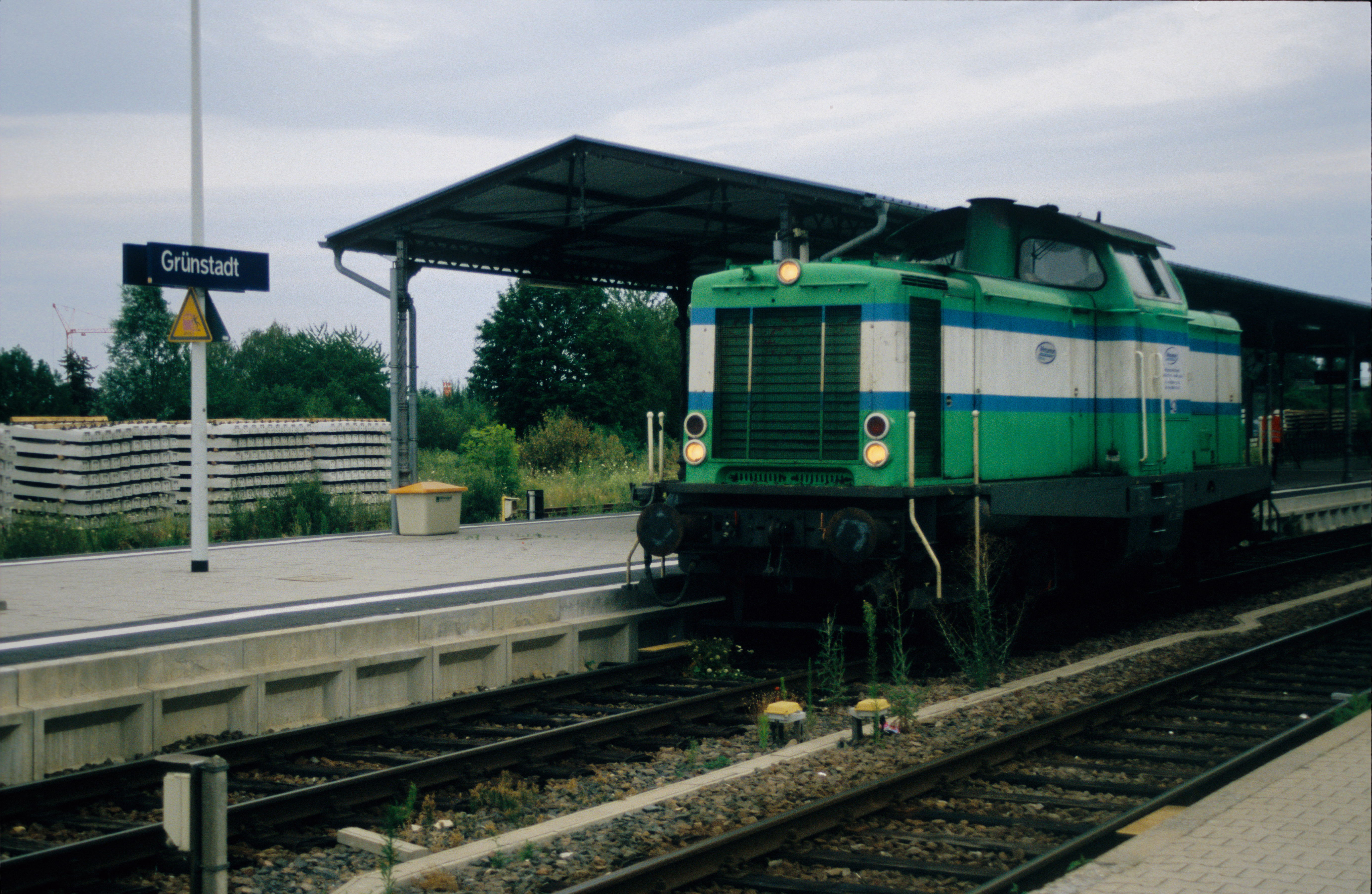 Lok 42 der Rhenus Rail St. Ingbert GmbH im Grünstadter Bahnhof, Locomotive 42 of the Rhenus Rail St. Ingbert GmbH in the Grünstadt station, Locomotive 42 des Rhenus Rail St. Ingbert GmbH dans la gare de Grünstadt (Camera = Canon EOS 500, Film = Sensia 100)